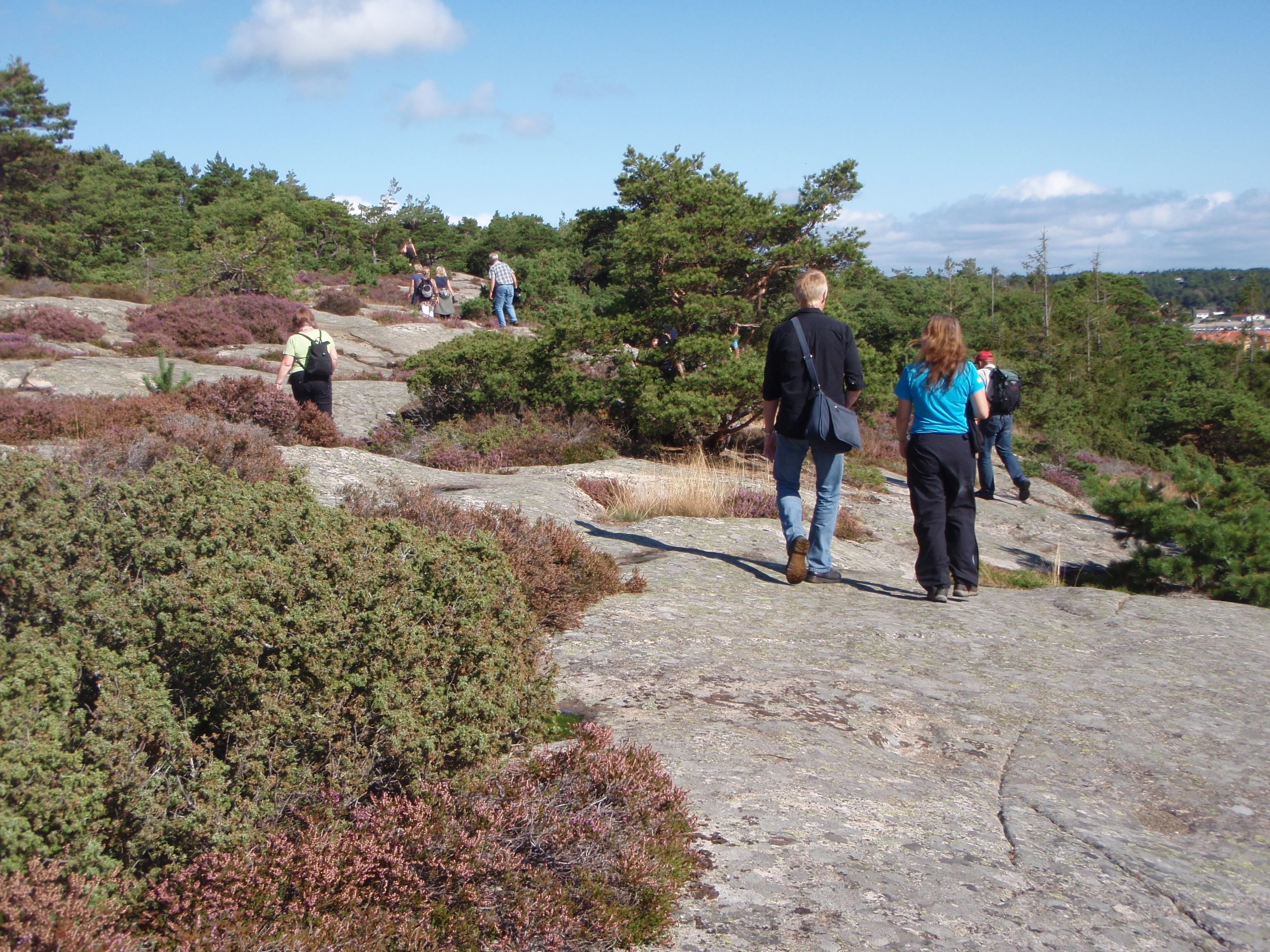 Sti fra Homlungen fyr på Hvaler